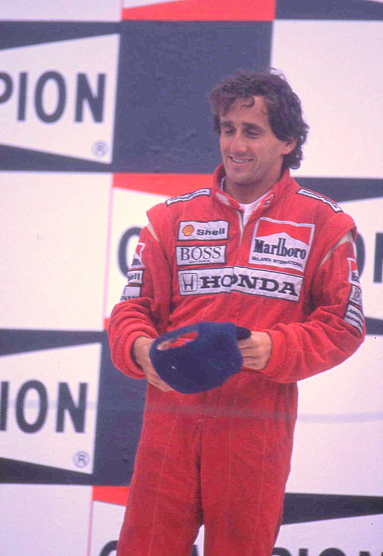 Alain Prost - Spa 1989.McLaren-Honda. Second . (scan diapo )